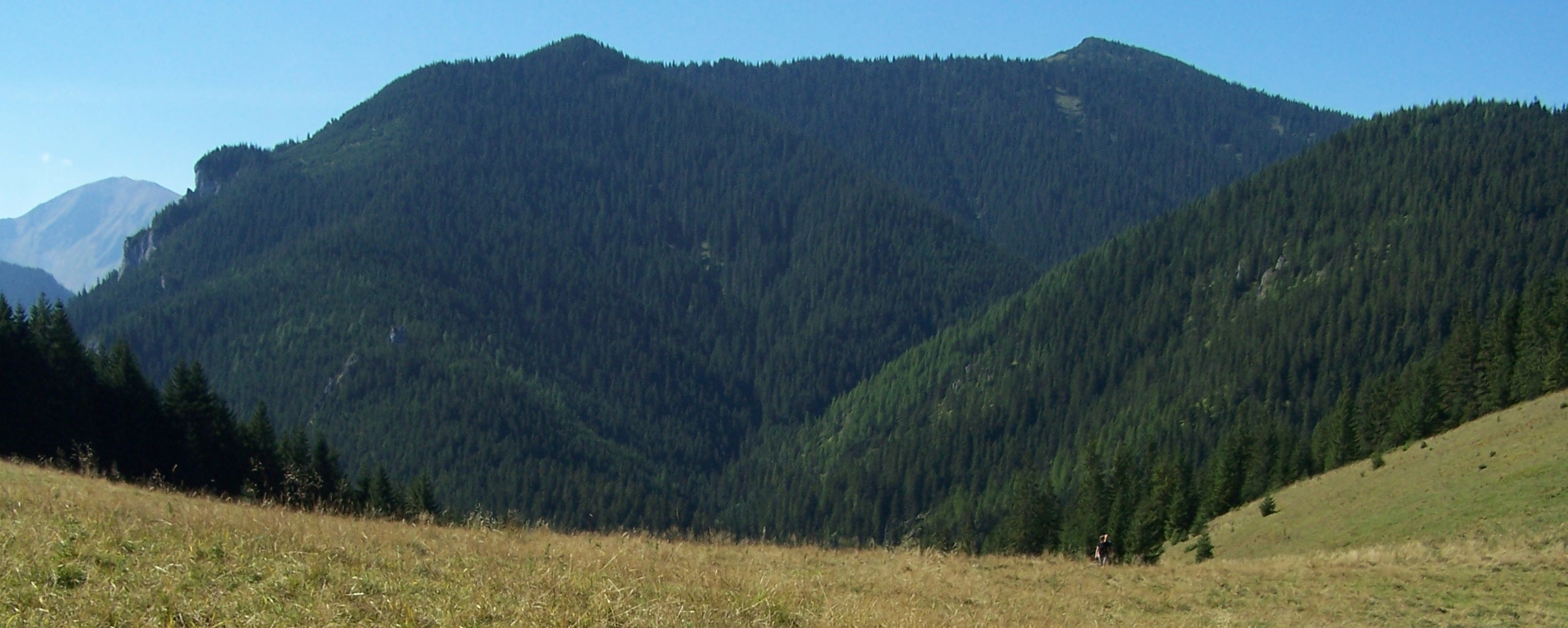 Widok z Polany Jamy na masyw Bobrowca, dolinę Głębowiec i Jaworzyński Przysłop